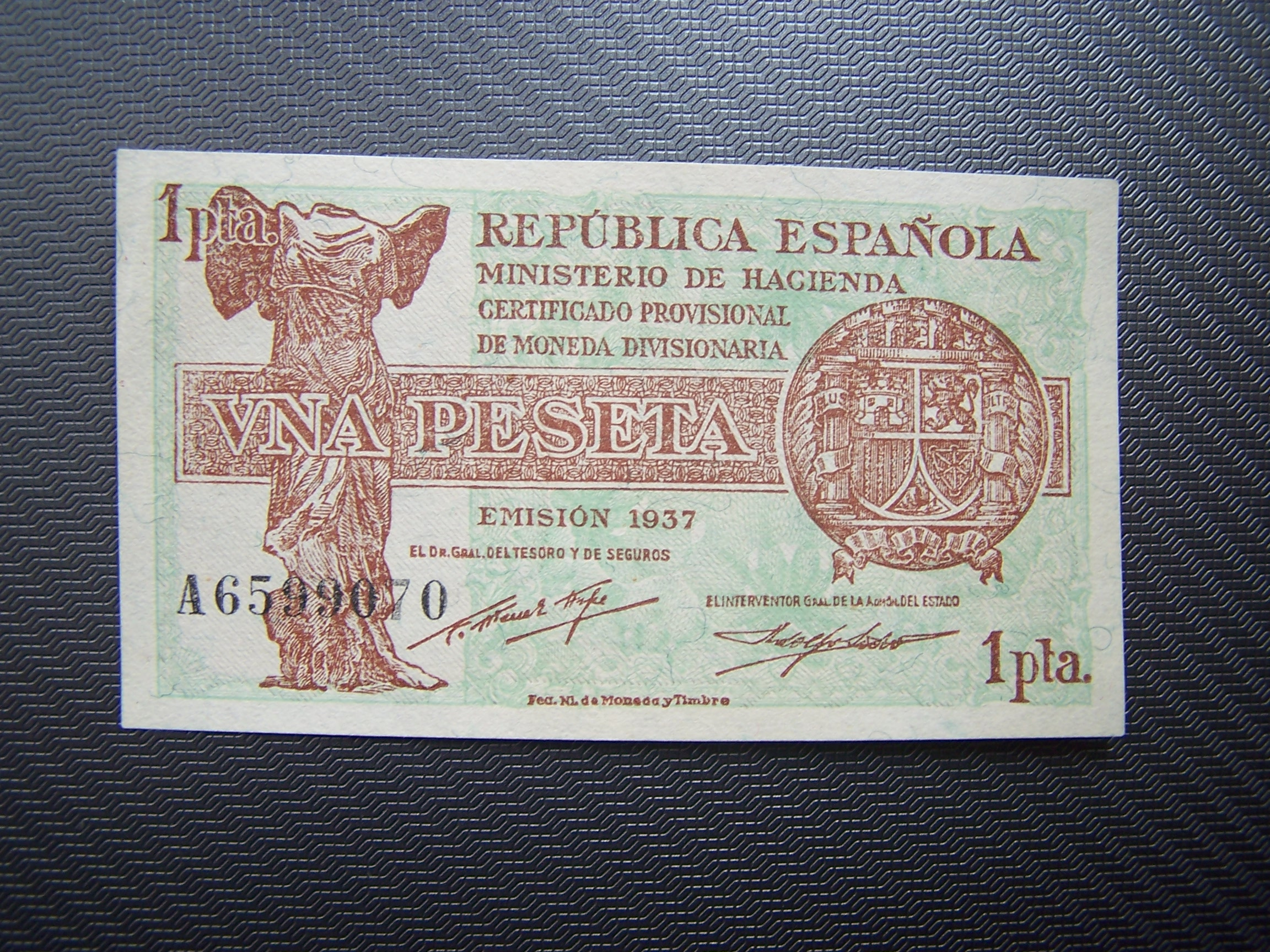 Billete de una peseta 1937 (anverso)